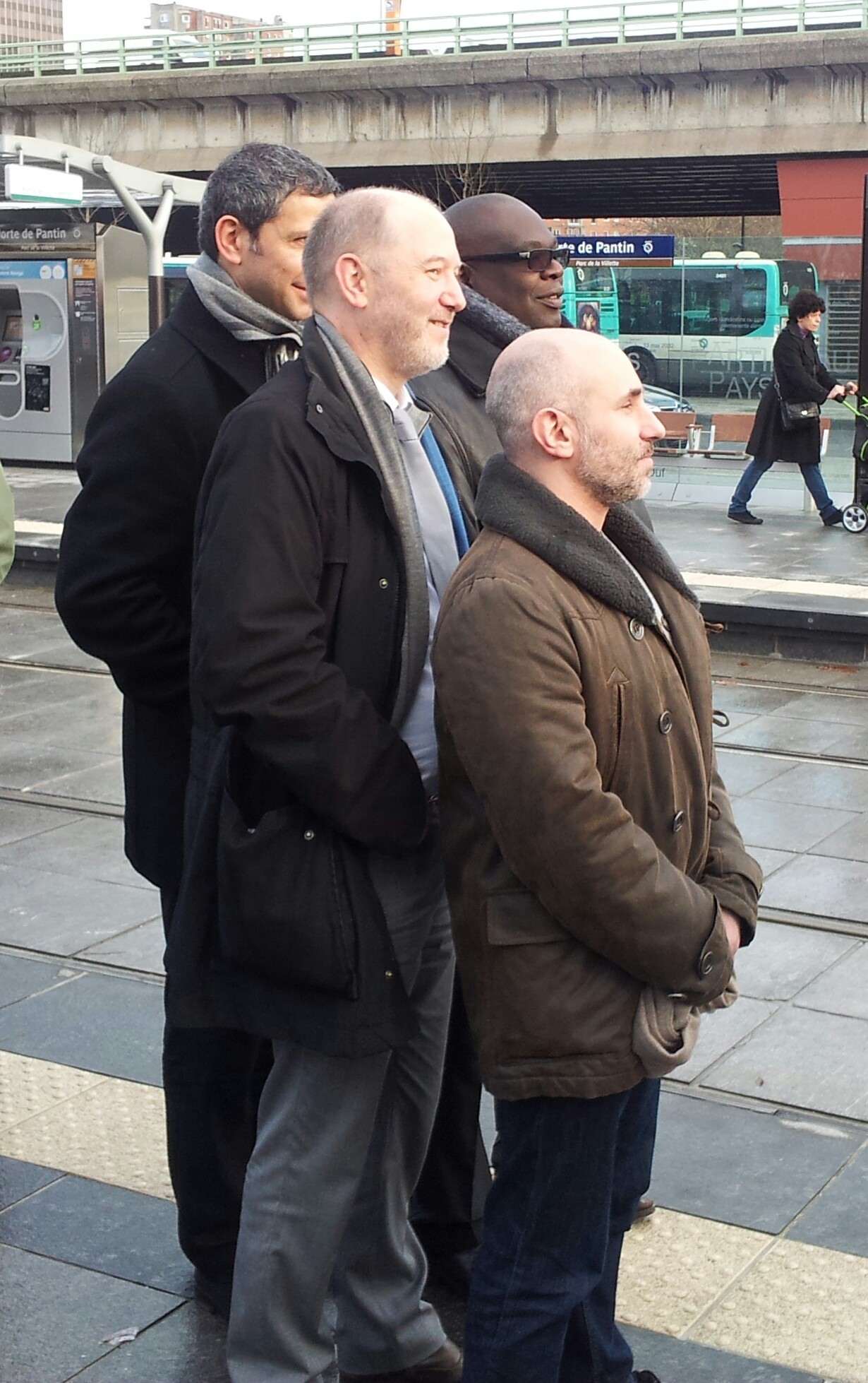 Les écolos étaient également bien représentés à l'inauguration du T3 : de gauche à droite, Christophe Najdovski, adjoint au maire de Paris chargé de la petite enfance ; Denis Baupin, député de Paris ; Jean-Jacob Bicep, député européen, et Pierre Serne, vice-président du conseil régional d'Île-de-France chargé des transports et (du coup) du syndicat des transports d'Île-de-France. Non, ils ne posaient pas pour moi. J'ai volé la photo. Je sais, c'est mal. (742P1841)